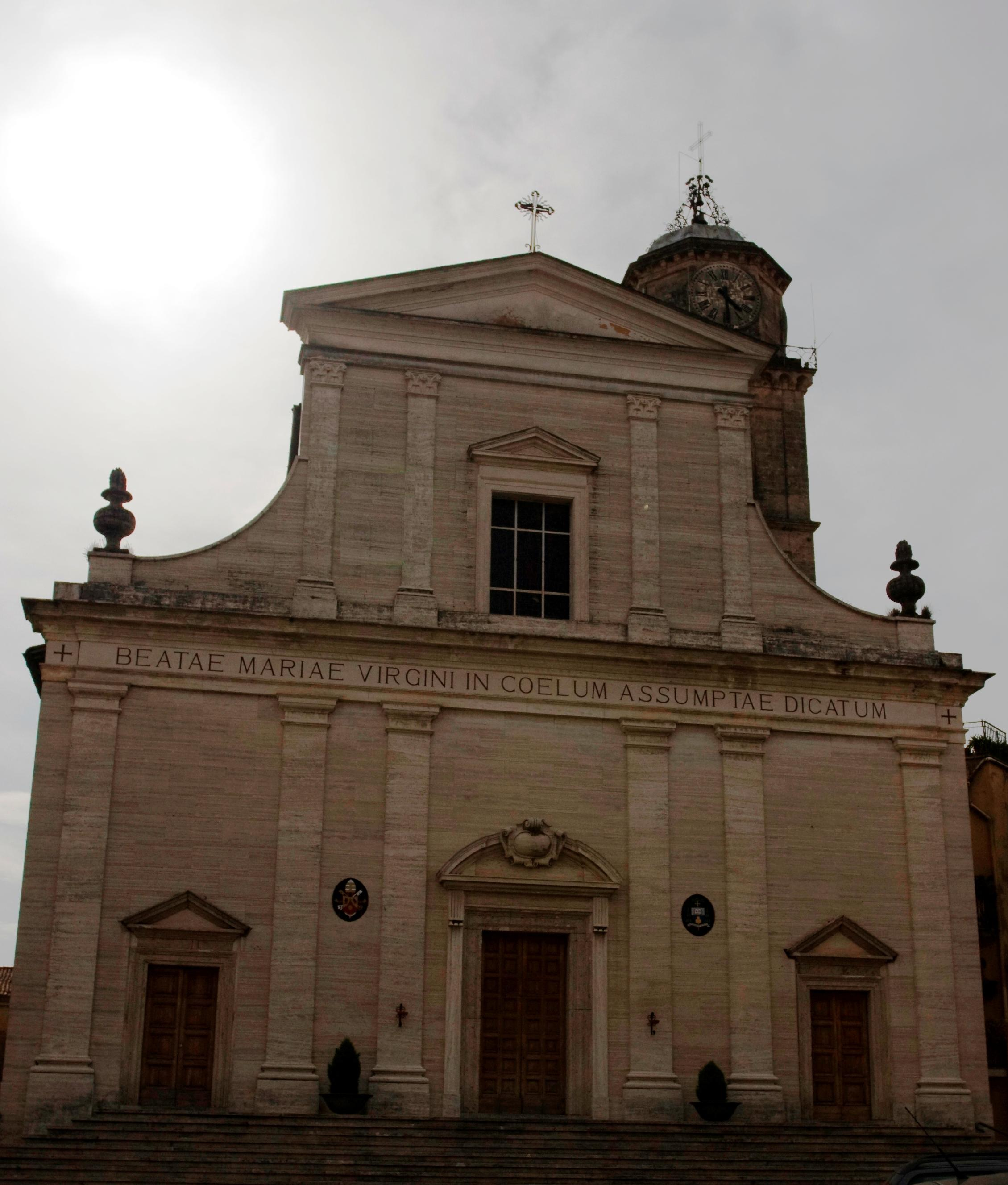 Cattedrale di Frosinone